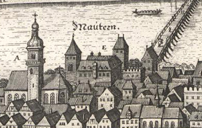 Das niederösterreichische Schloss Mautern auf einem Stich von Matthäus Merian